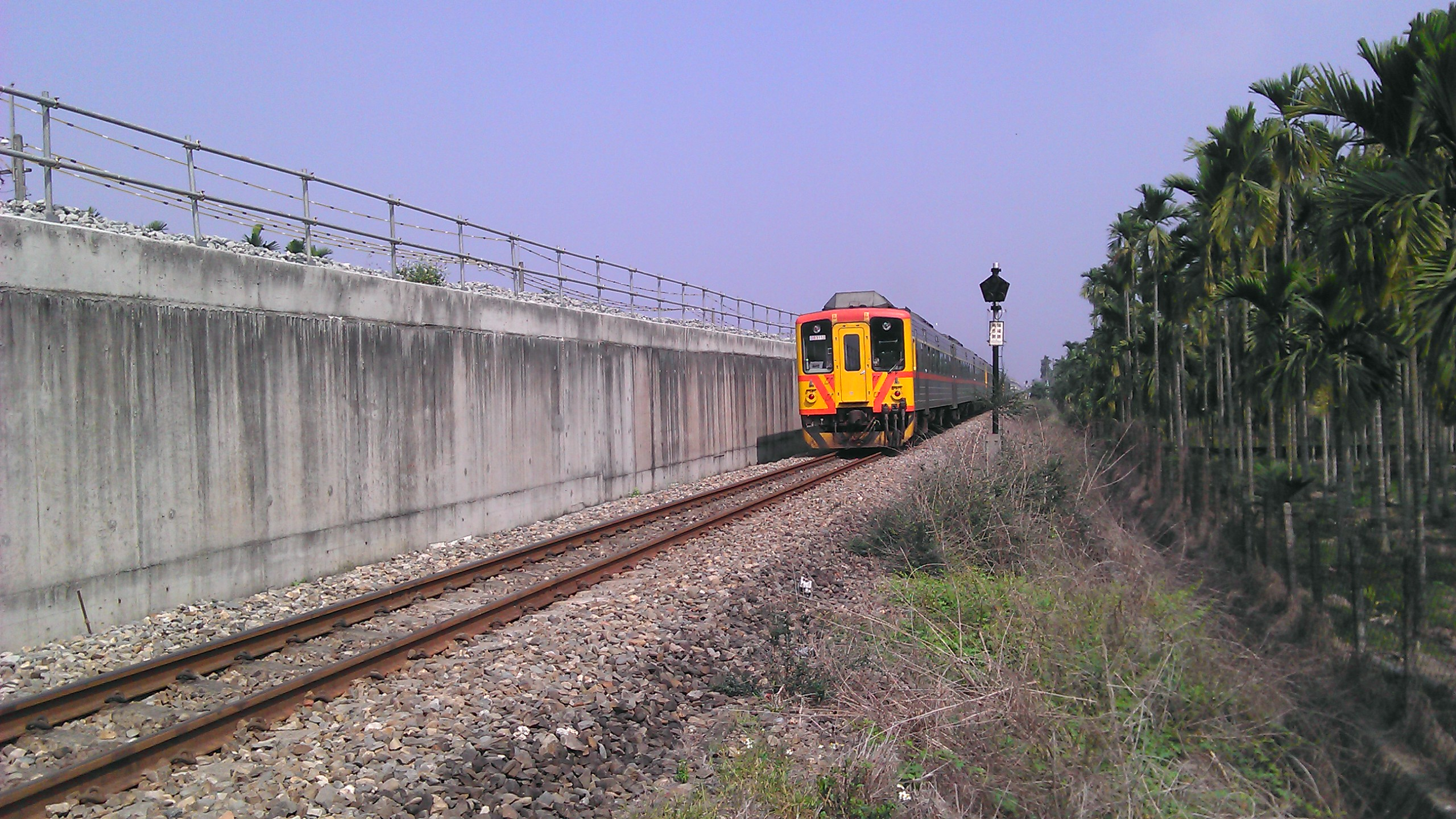 位於潮州鎮及竹田鄉交界的屏東線鐵路，一列自強號列車正經過此處。